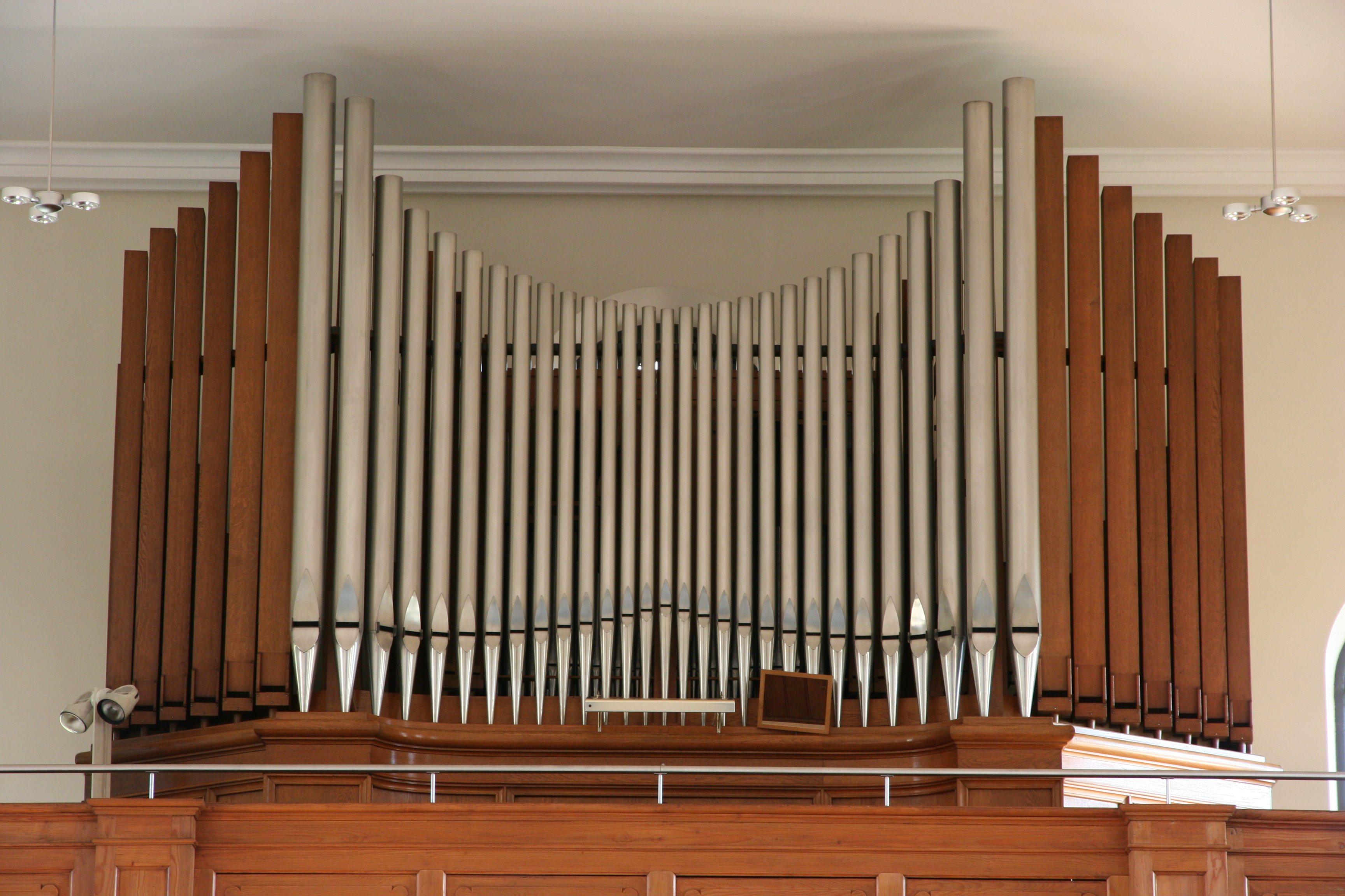 Römisch-katholische Pfarrkirche St. Pirminius Pfungen